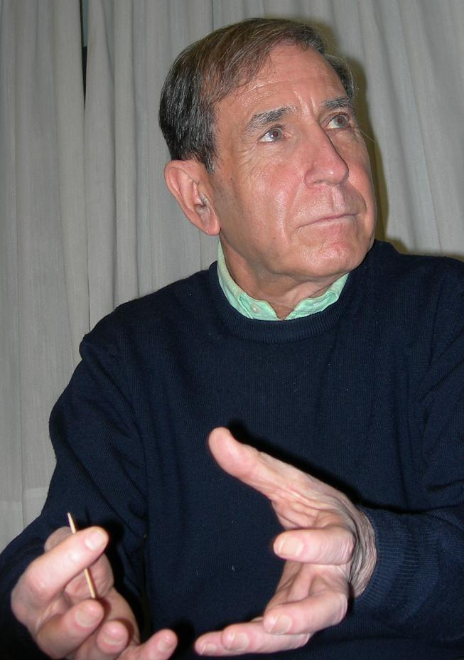 Shlomo Ben Ami (1943-), político y escritor israelí, en noviembre de 2006 durante una tertulia en un colegio mayor de Madrid.